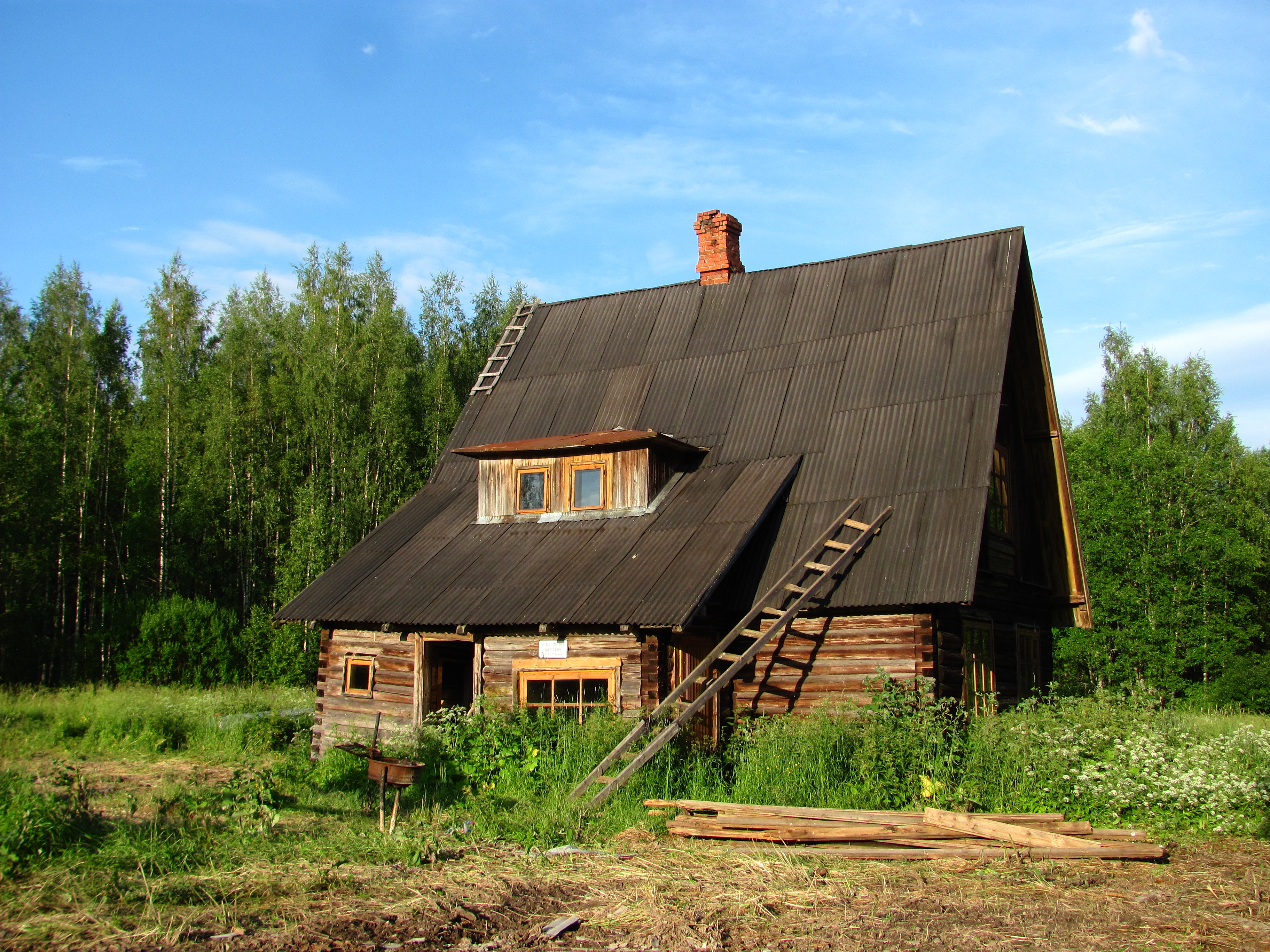 Varessaare